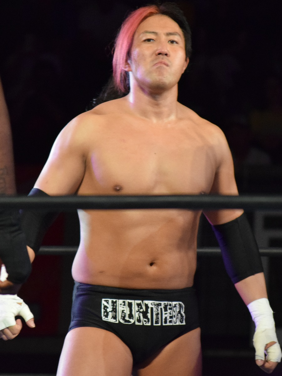 2016年5月29日 大阪市中央体育館・サブアリーナ 「BEST OF THE SUPER Jr.XXIII」 ヨシタツ